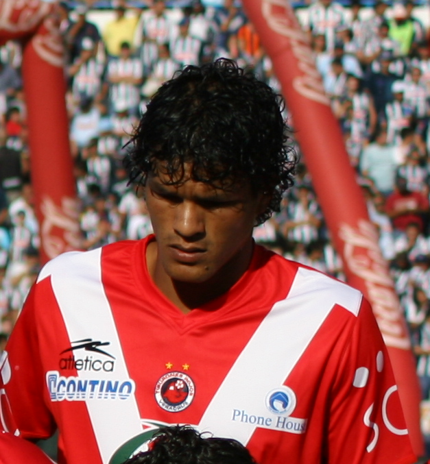 Antes de que les clavaran siete, tan optimistas que se veían.